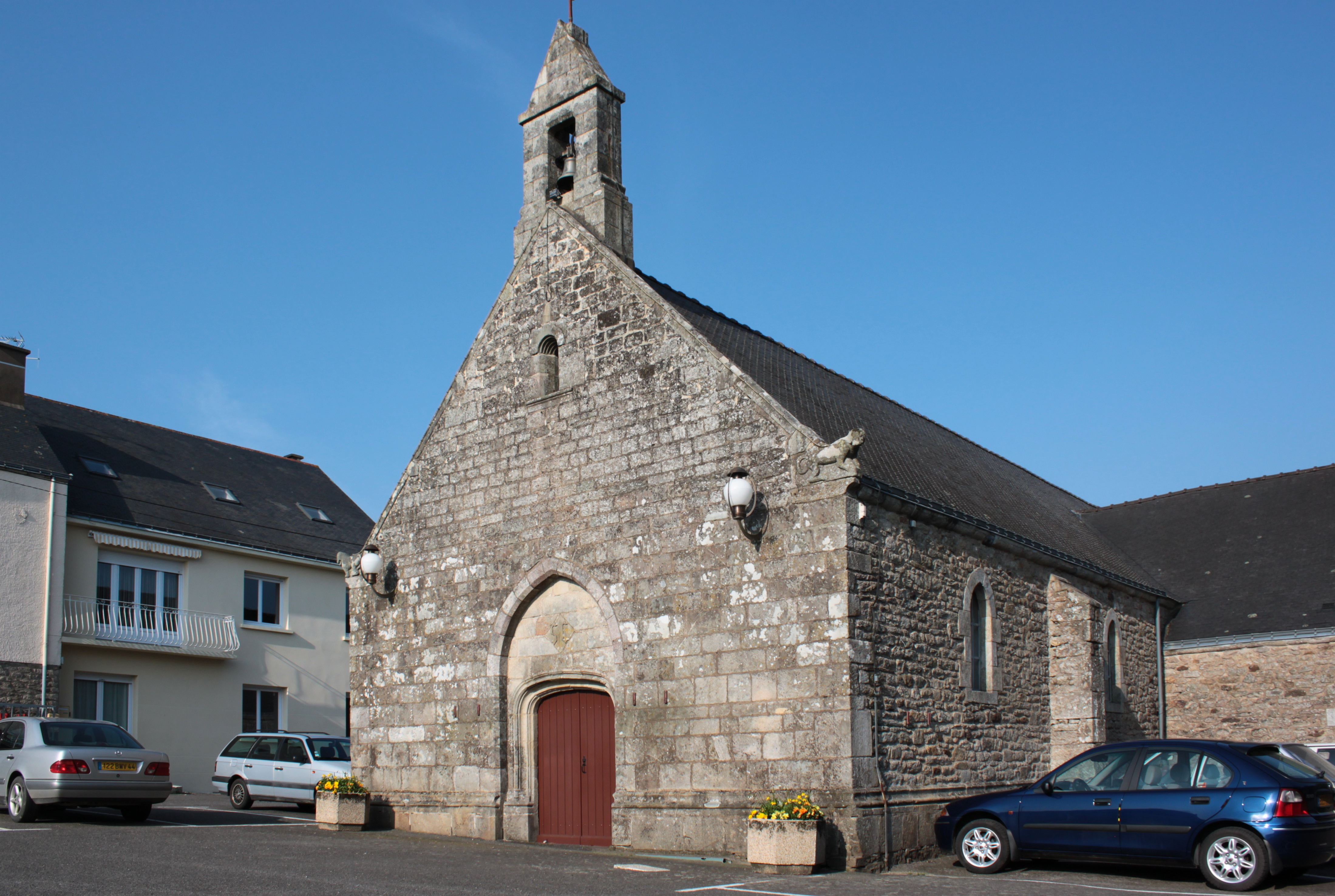 Chapelle Saint-Cry, Fr-56-Nivillac.